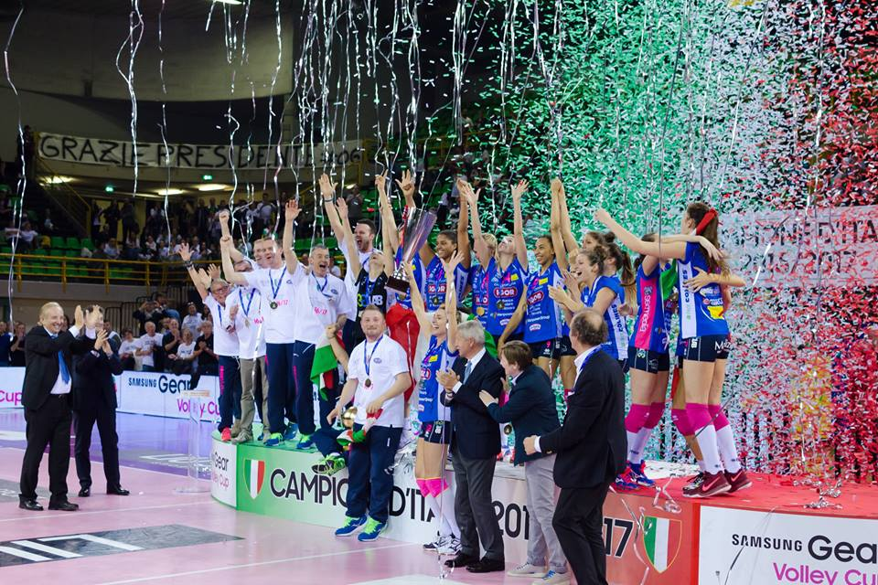 Vedi titolo